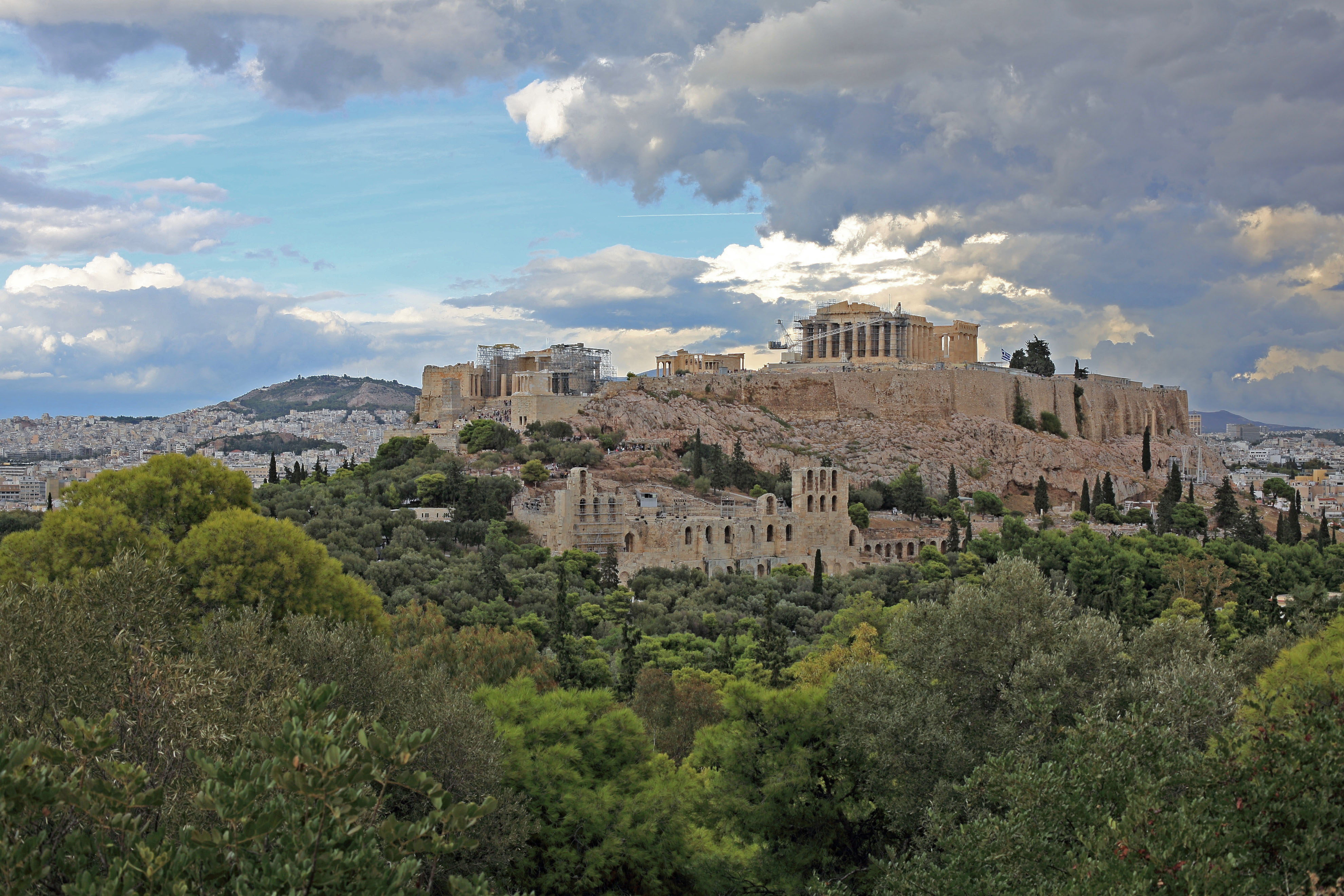 Acropole z pahorku Filopáppou.